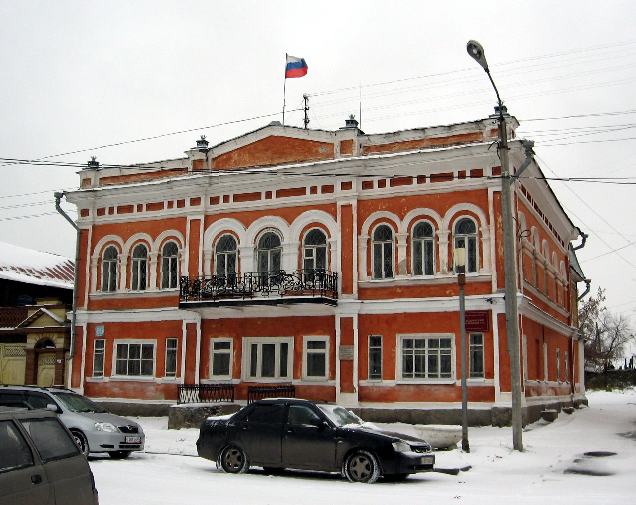 Дом Треухова: ул. Октябрьская, 88 (Шадринск)